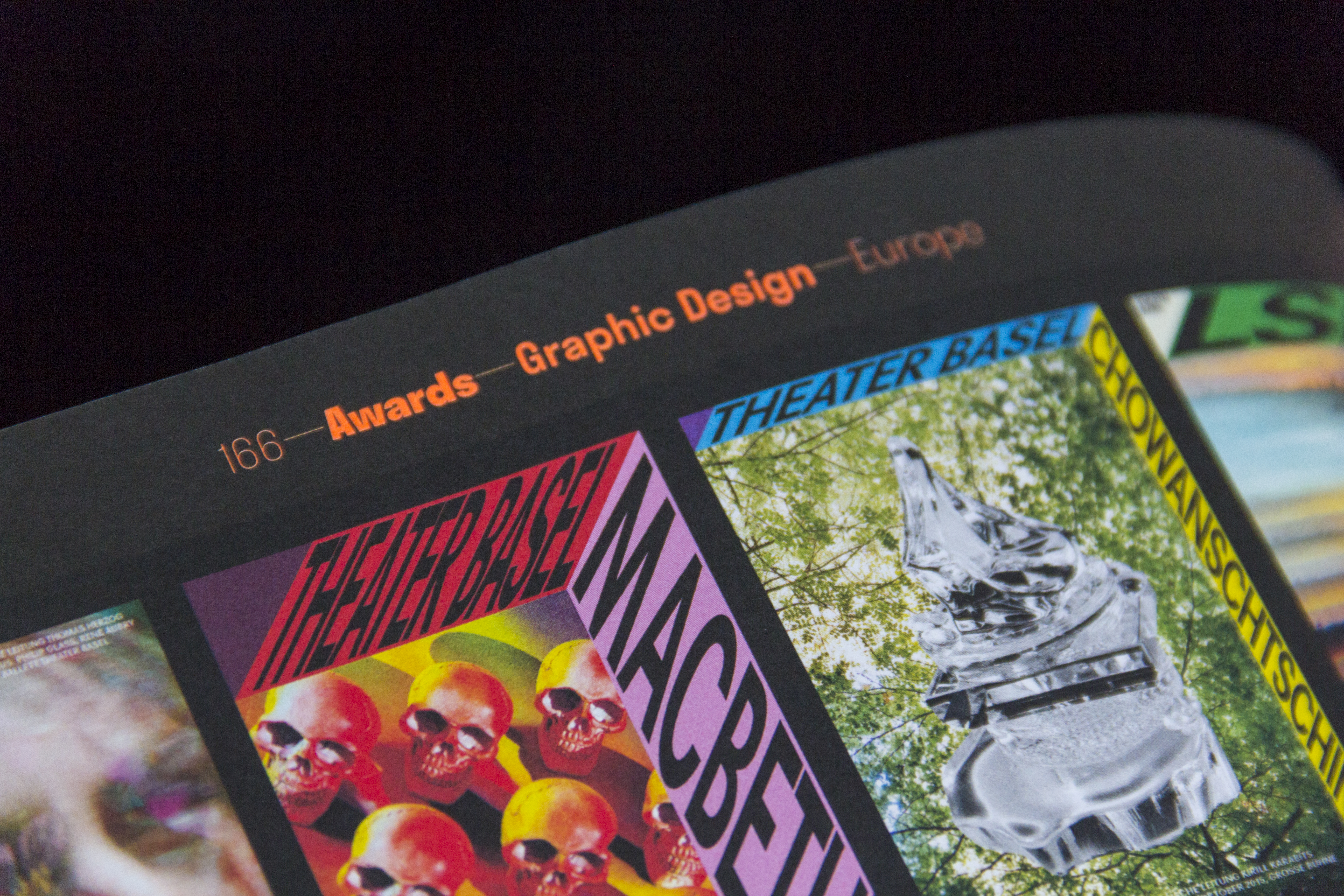 Záhlaví sloužící jako orientační systém v knize 365 typo 2.